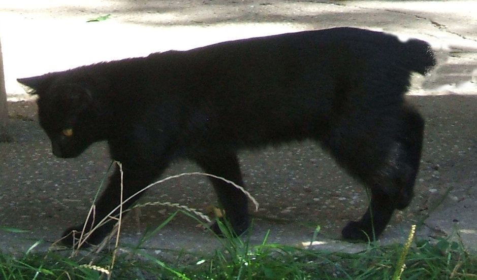 Manx2